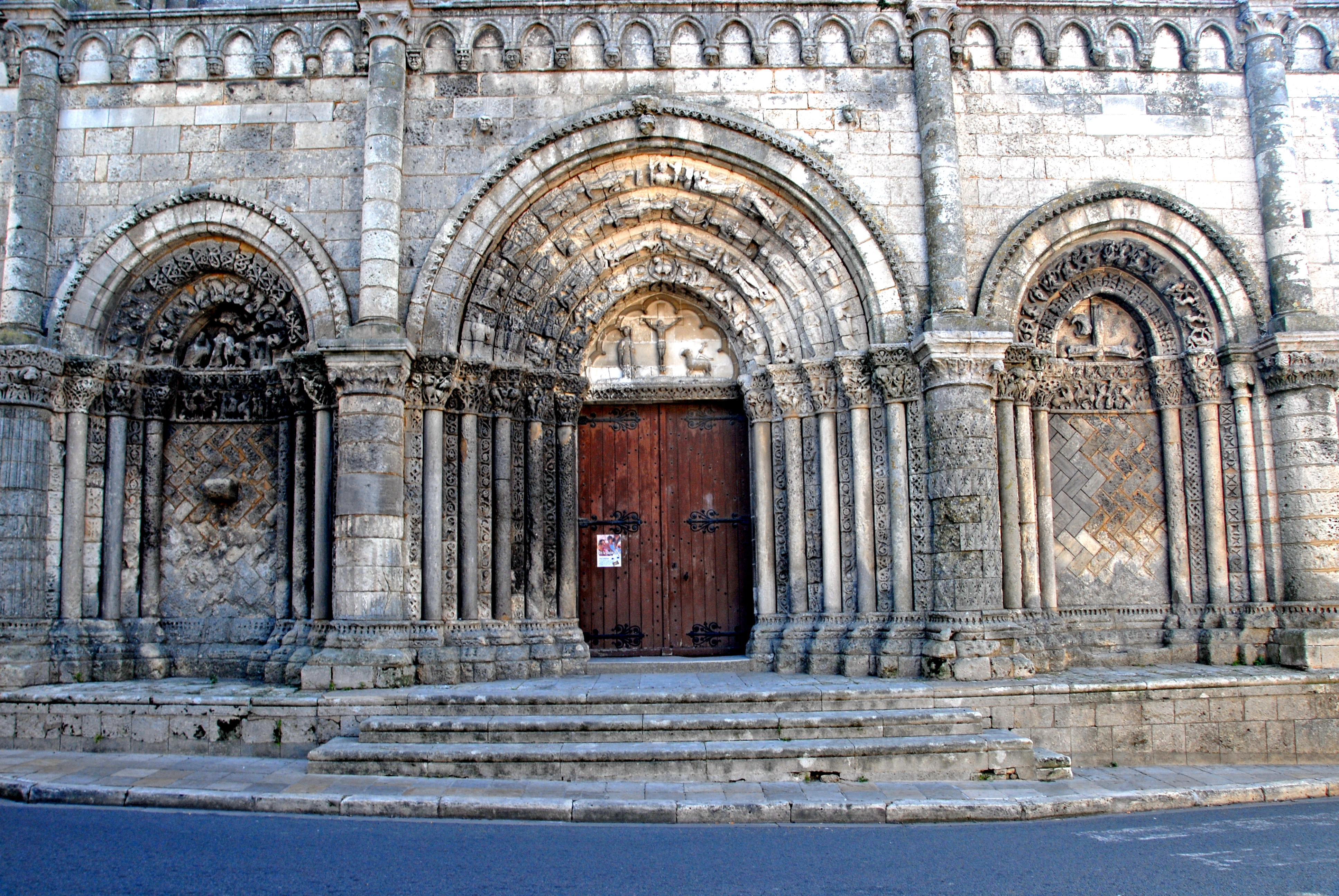 St-Pierre de Pont-l’Abbé-d’Arnoult (17), Fassade und Turm von S-W